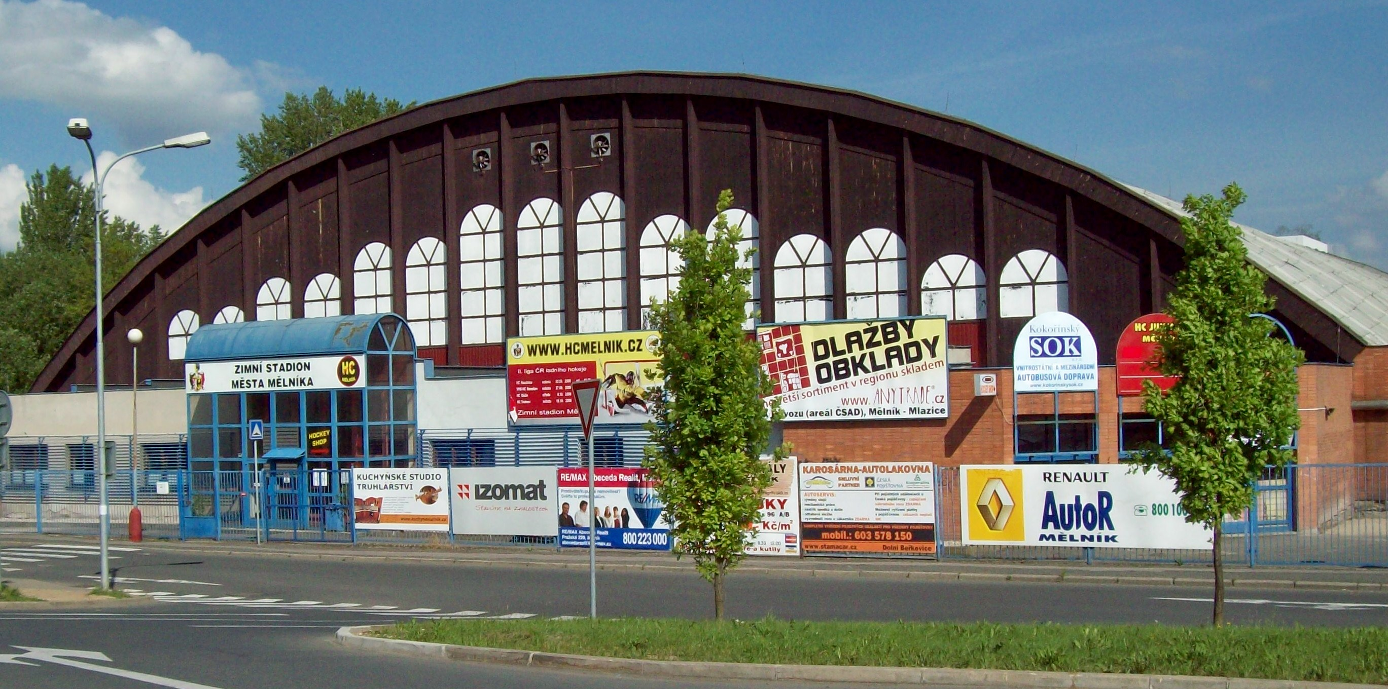 Zimní stadión města Mělníka.